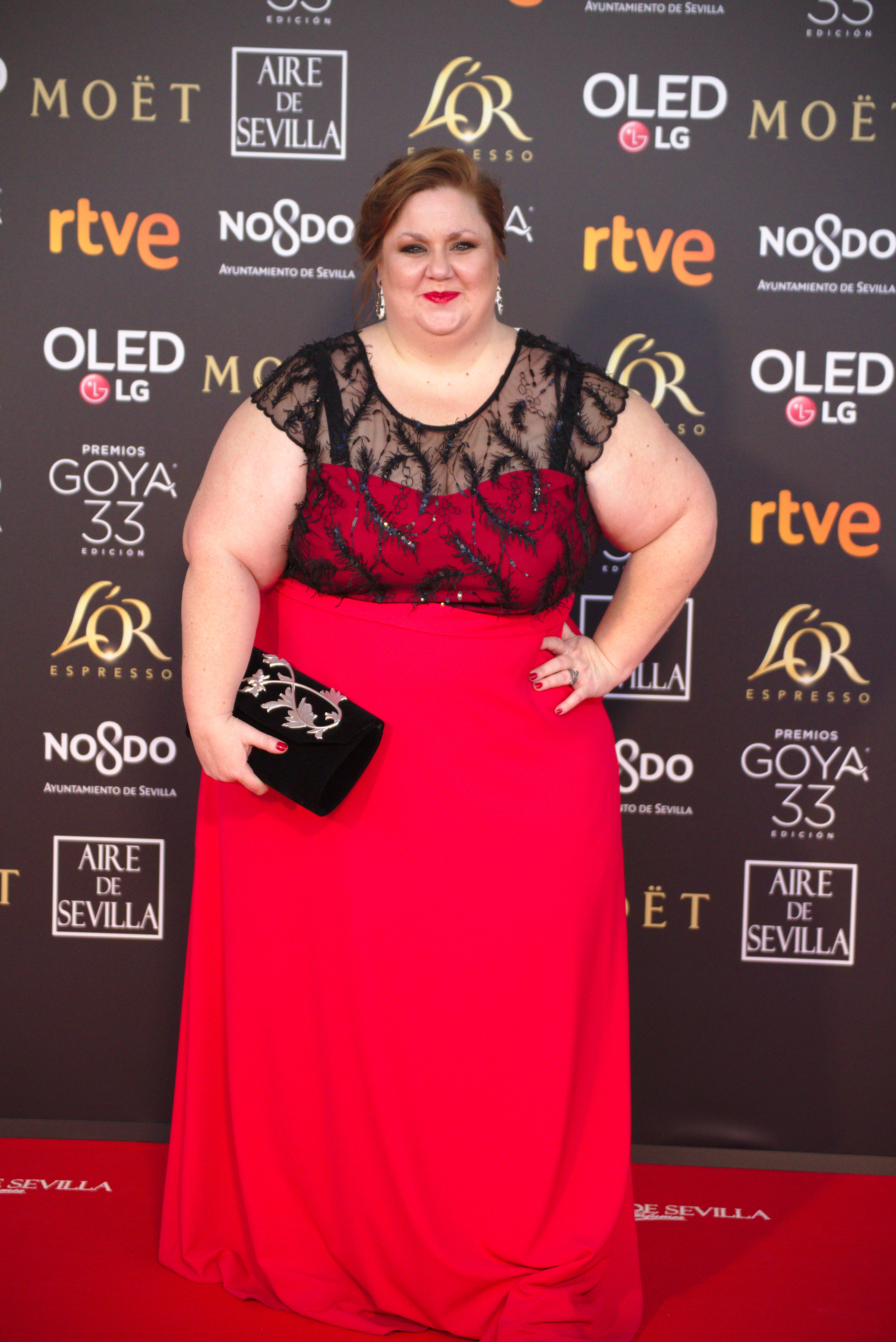 Itziar Castro en la alfombra roja de los Premios Goya celebrados en Sevilla en febrero de 2019